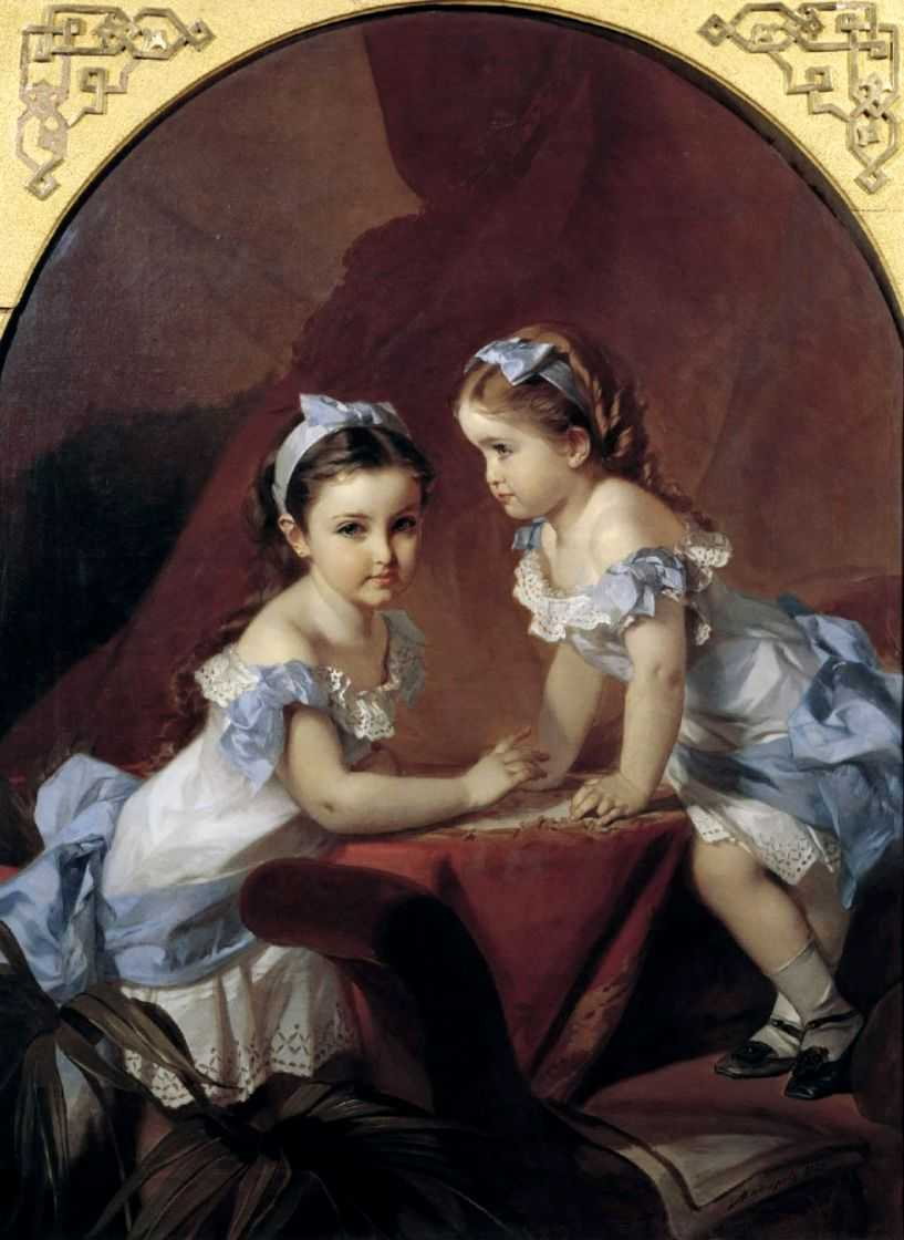 Девочки-сестры. Портрет Лизы и Наташи Араповых (внучки Натальи Николаевны Гончаровой и Пётра Петровича Ланского, дочери Елизаветы Петровны Ланской и полковника Кавалергардского полка Николая Андреевича Арапова)